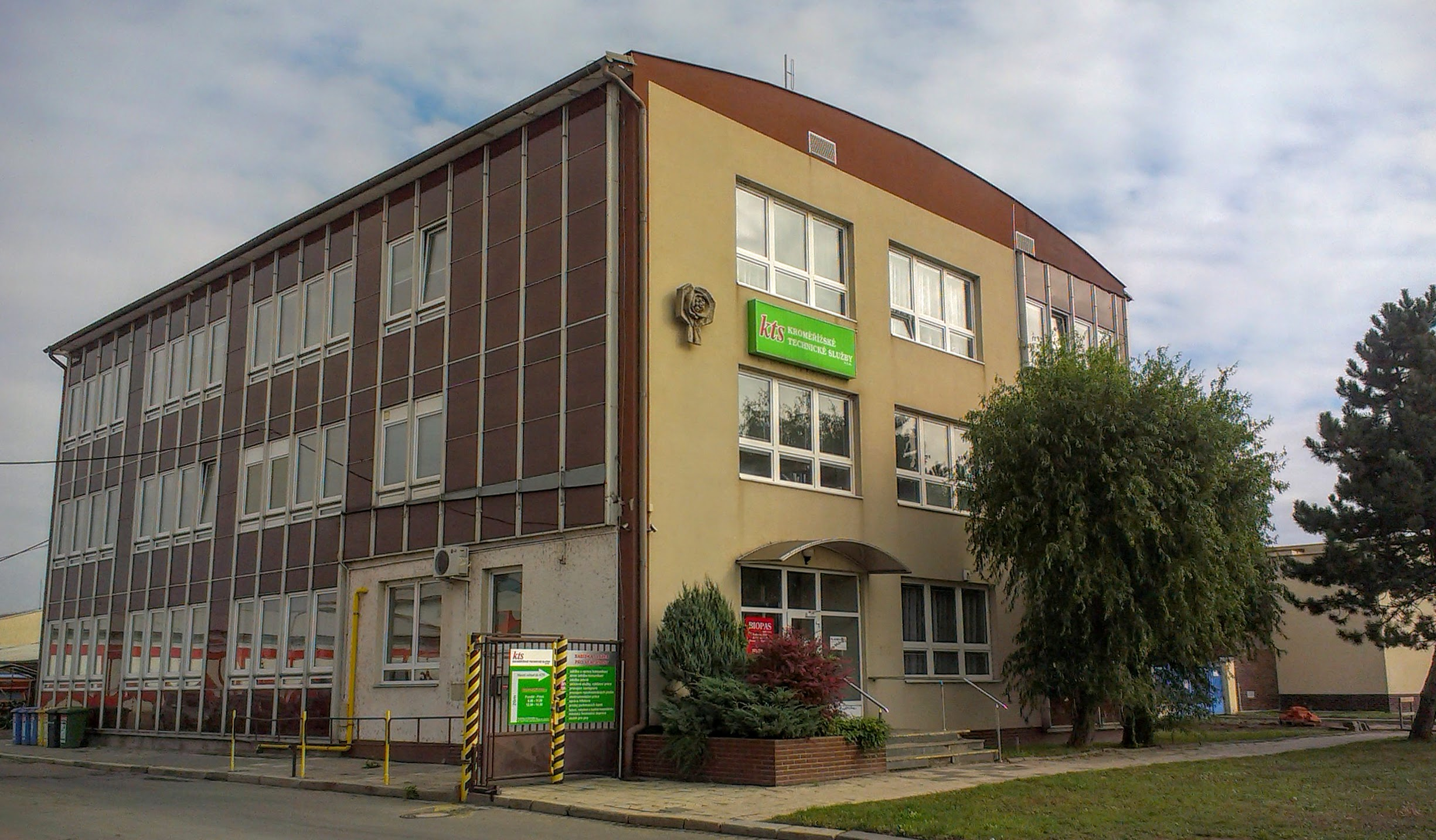 Kroměřížské technické služby, s.r.o.